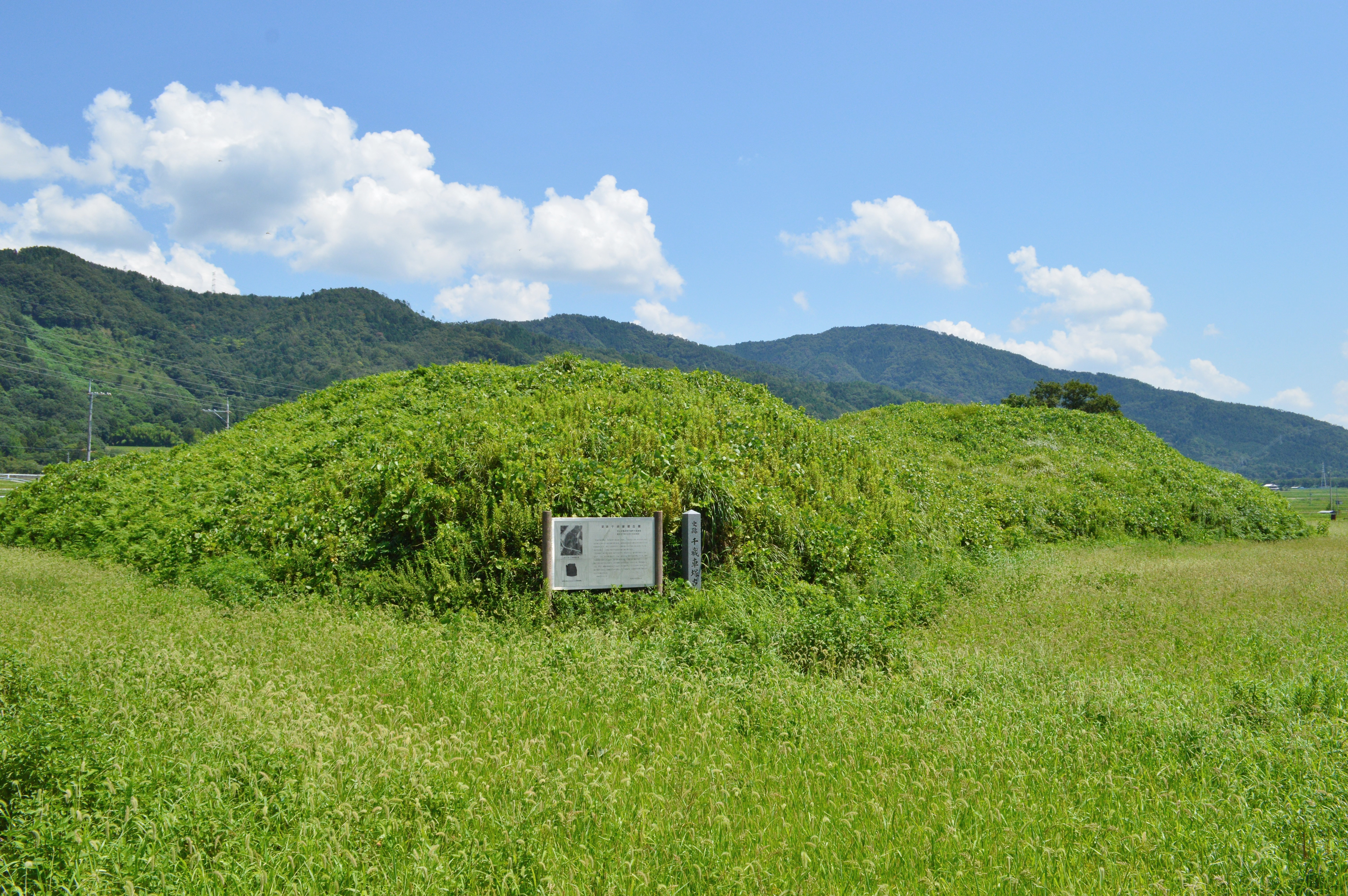 千歳車塚古墳 全景